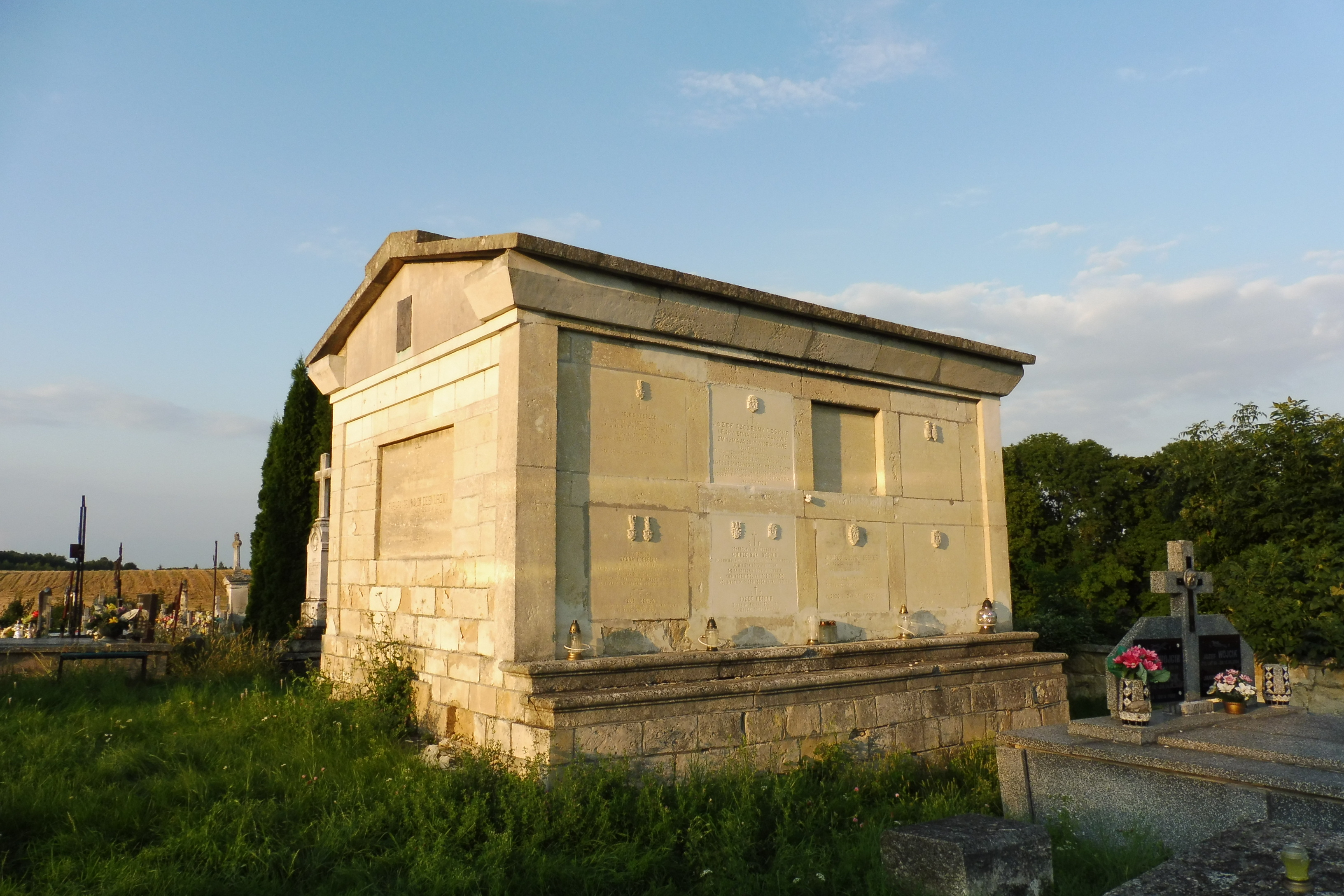 Sancygniów - grobowiec rodziny Deskurów